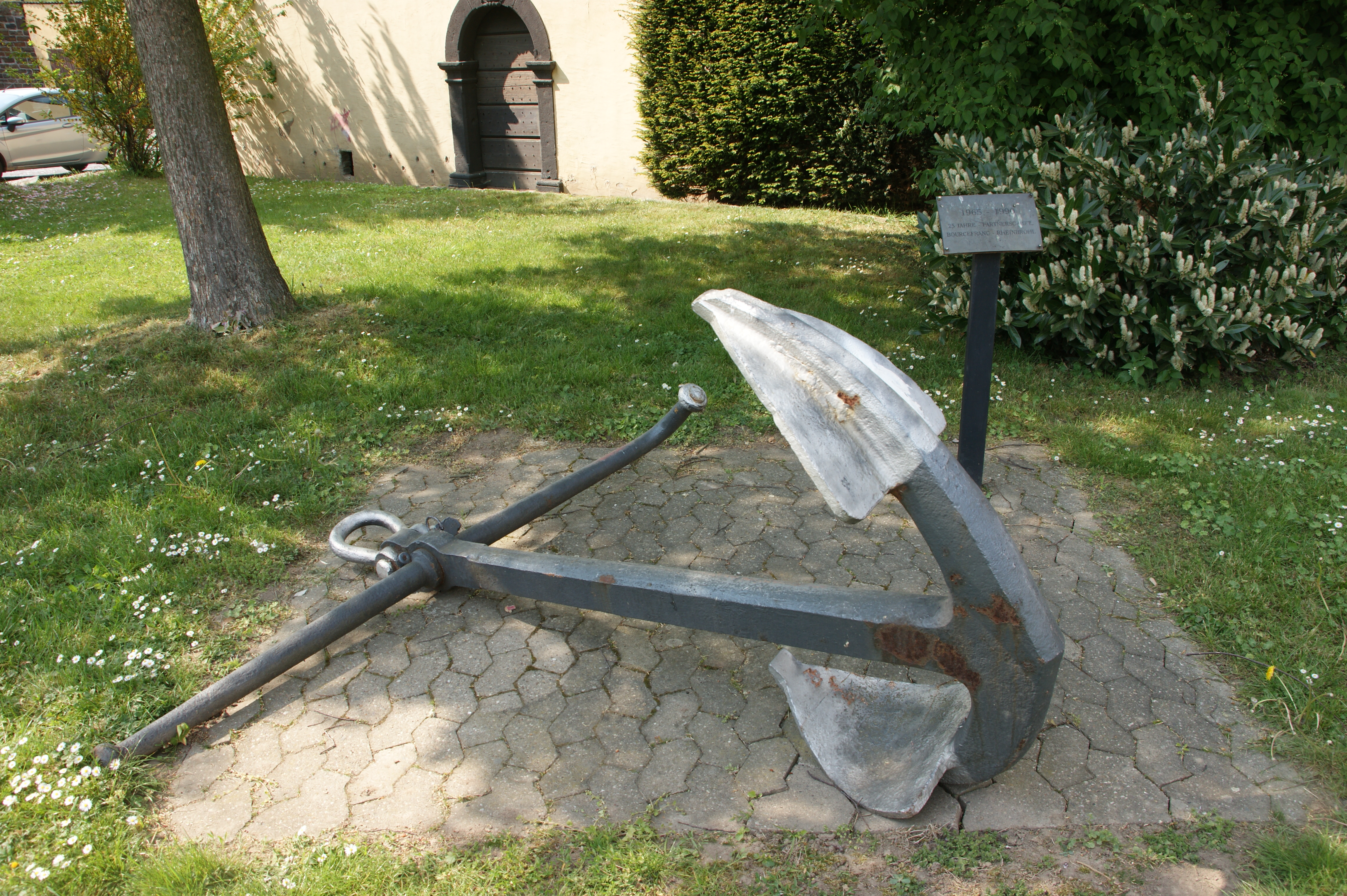 Anker vor der Gertrudenkapelle: Partnerschaft Rheinbrohl - Bourcefranc-le-Chapus